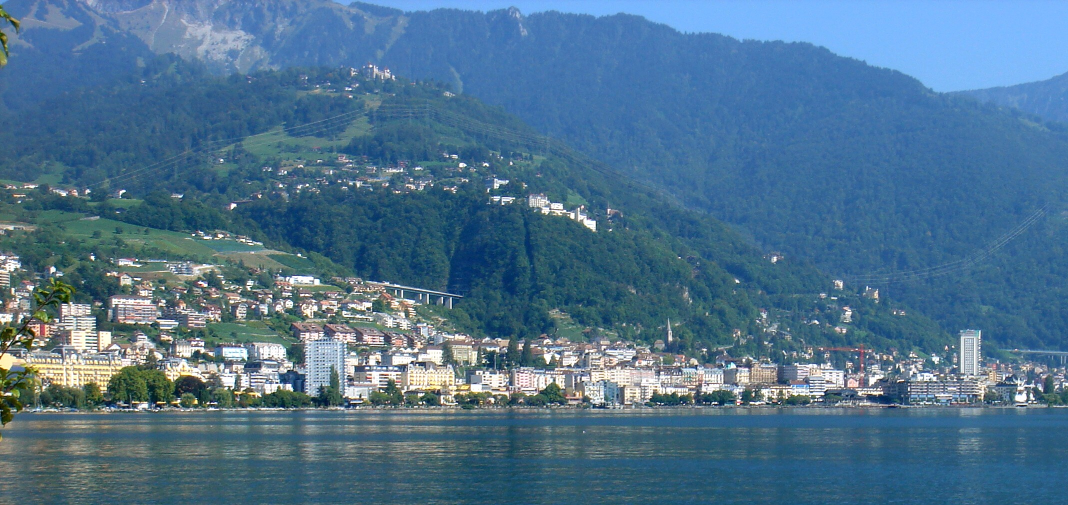 Montreux (Svizzera): veduta del centro cittadino dal Lago di Ginevra.